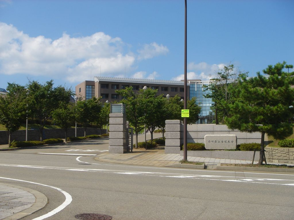 石川県立看護大学 石川県かほく市 撮影者：投稿者(Monami)、撮影日：2006年8月